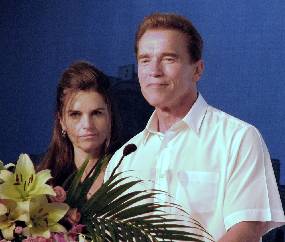 Modified version of Image:Arnold Schwarznegger and Maria Schriver.JPG